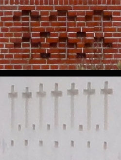 Opduin Badweg 30 in Schiermonnikoog (details met de gevelversiering)